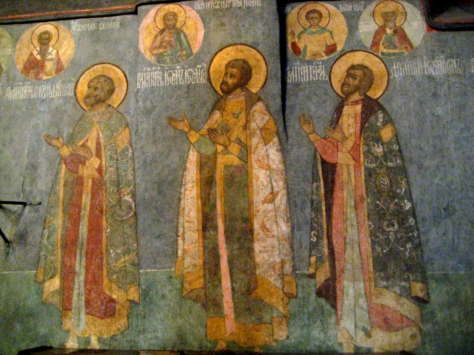 Фрески с изображением московских князей над их гробами в Архангельском соборе